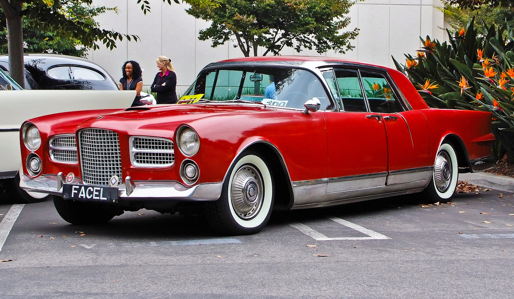 1958 Facel Vega Excellence hardtop sedan (1st series, EX1)